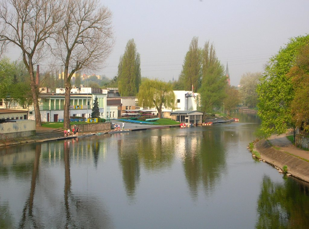 Brda w Bydgoszczy. Przystań "Bydgostii"